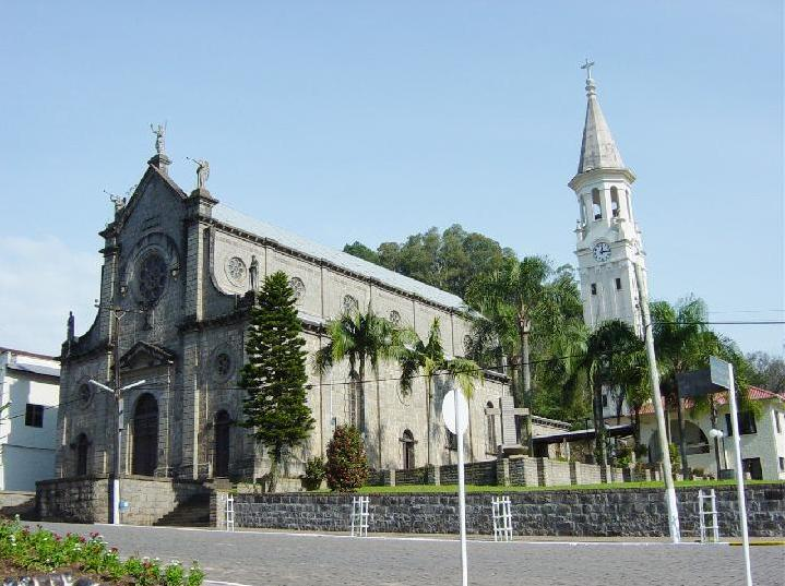 Igreja da Matriz, construída em basalto, um dos pontos mais visitados pelos turistas.